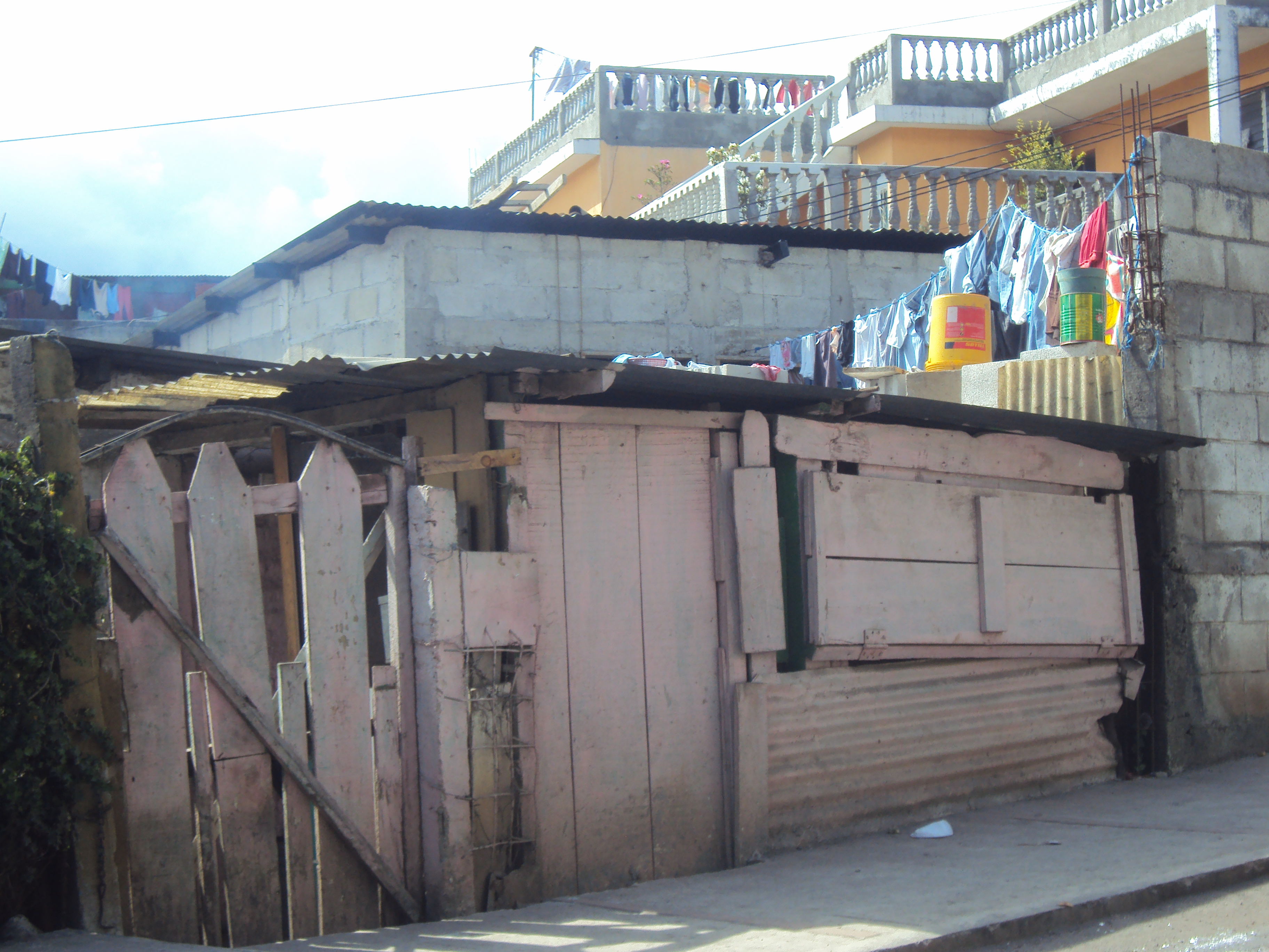 Fotos de pobreza en la zona de el pajon San jose Pinula